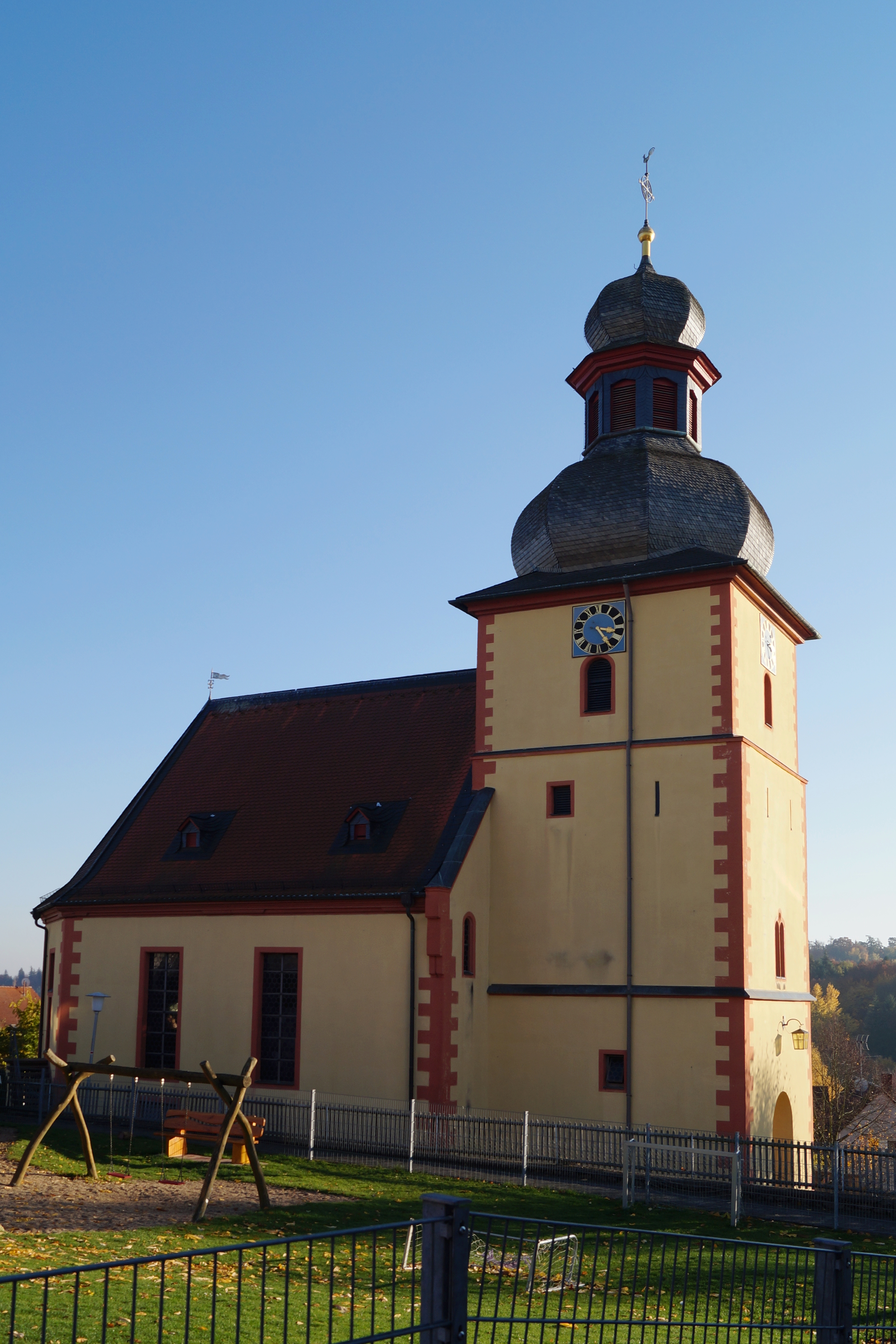 Evangelische Laurentiuskirche in Michelstadt-Vielbrunn, Odenwaldkreis in Hessen. Ansicht von Norden.